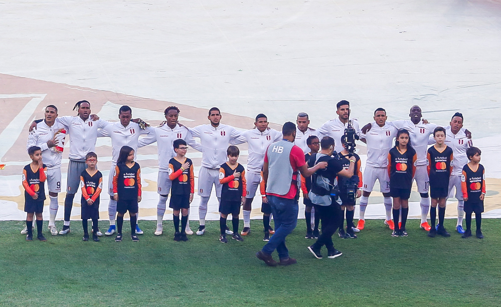 (Rio de Janeiro - RJ, 07/07/2019) Presidente da República, Jair Bolsonaro, durante a final da Copa América 2019, entre as seleções do Brasil e Peru. Foto: Carolina Antunes/PR